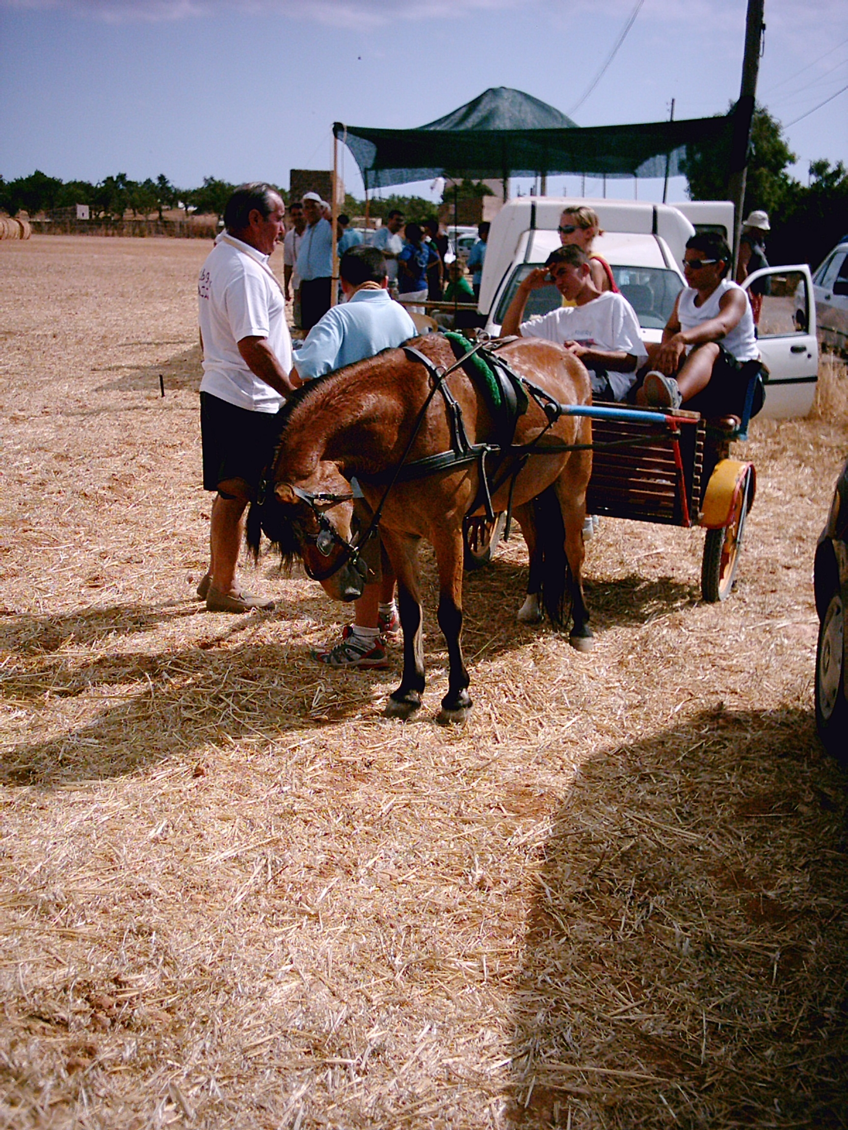 Carro estirat per un cavallet, a s'Aranjassa, Mallorca